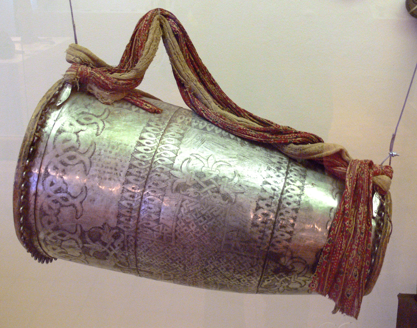 Stuttgart, Linden-Museum Kirchentrommel (Kebero), aus Silber, Tierhaut, Baumwolle; Amhara, Äthiopien, 1886; Inv. Nr. 21084